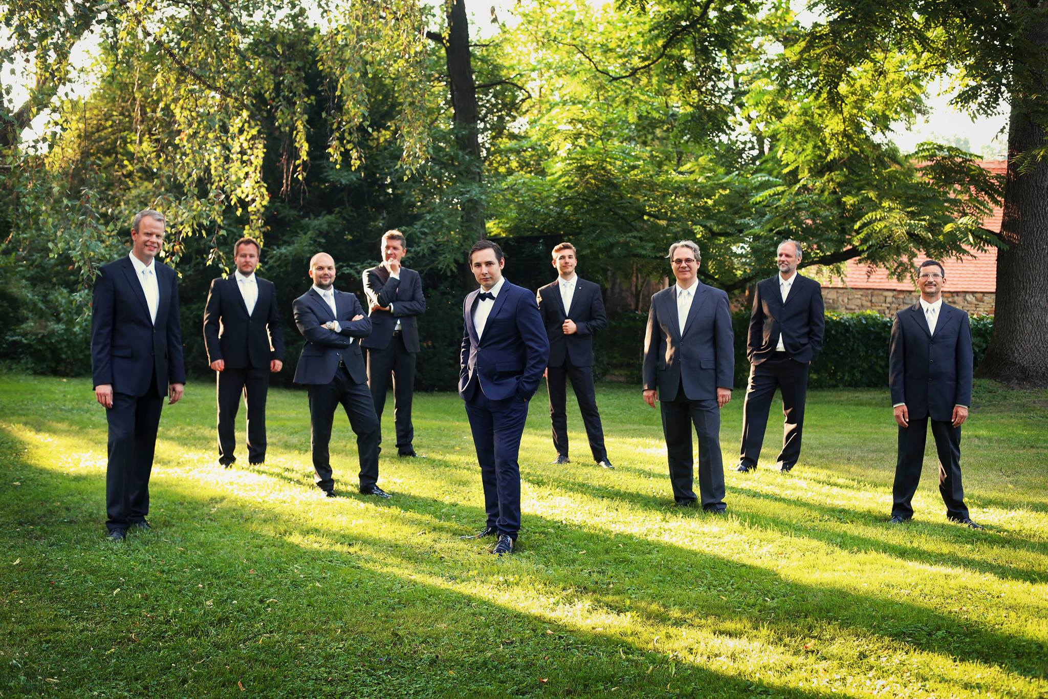 Vznik: 2013 Dirigent: Daniel Simandl